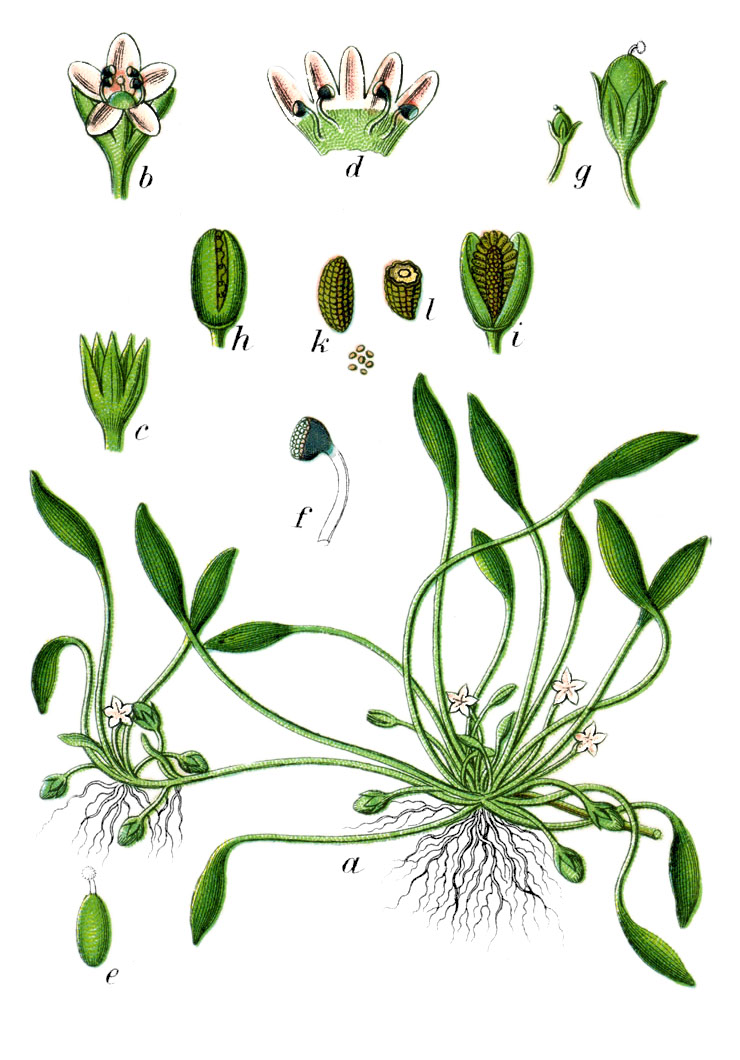 Original Caption Schlämmling, Limosella aquatica